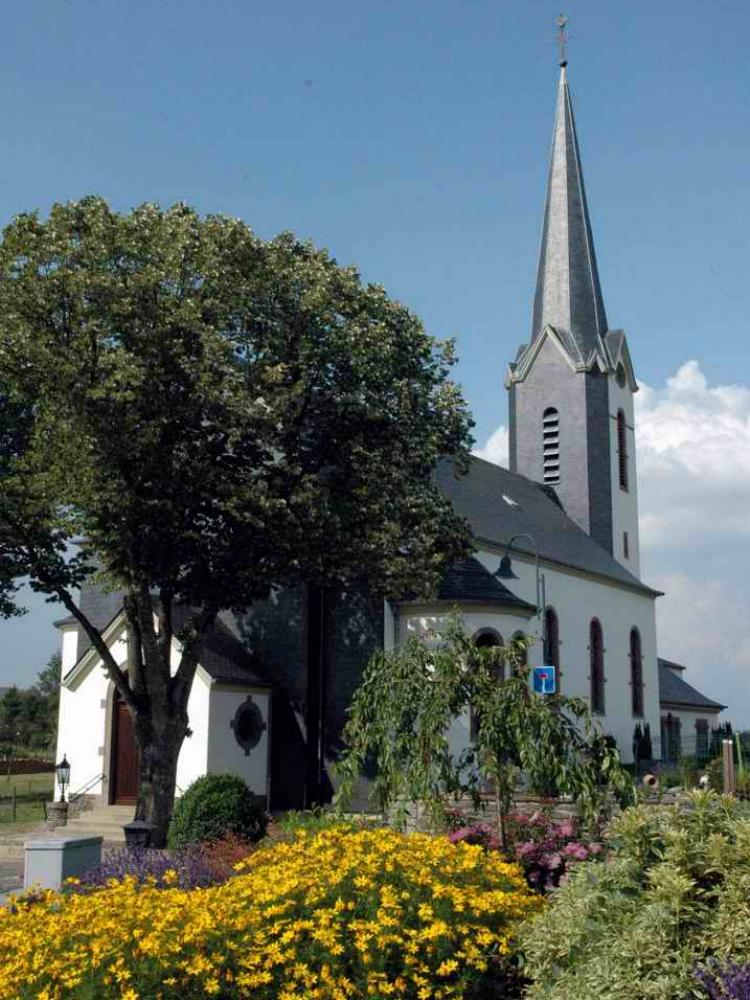 D'Kierch vun Eeschwëller, bannen. Photo vum Paschtouer Francis Erasmy.